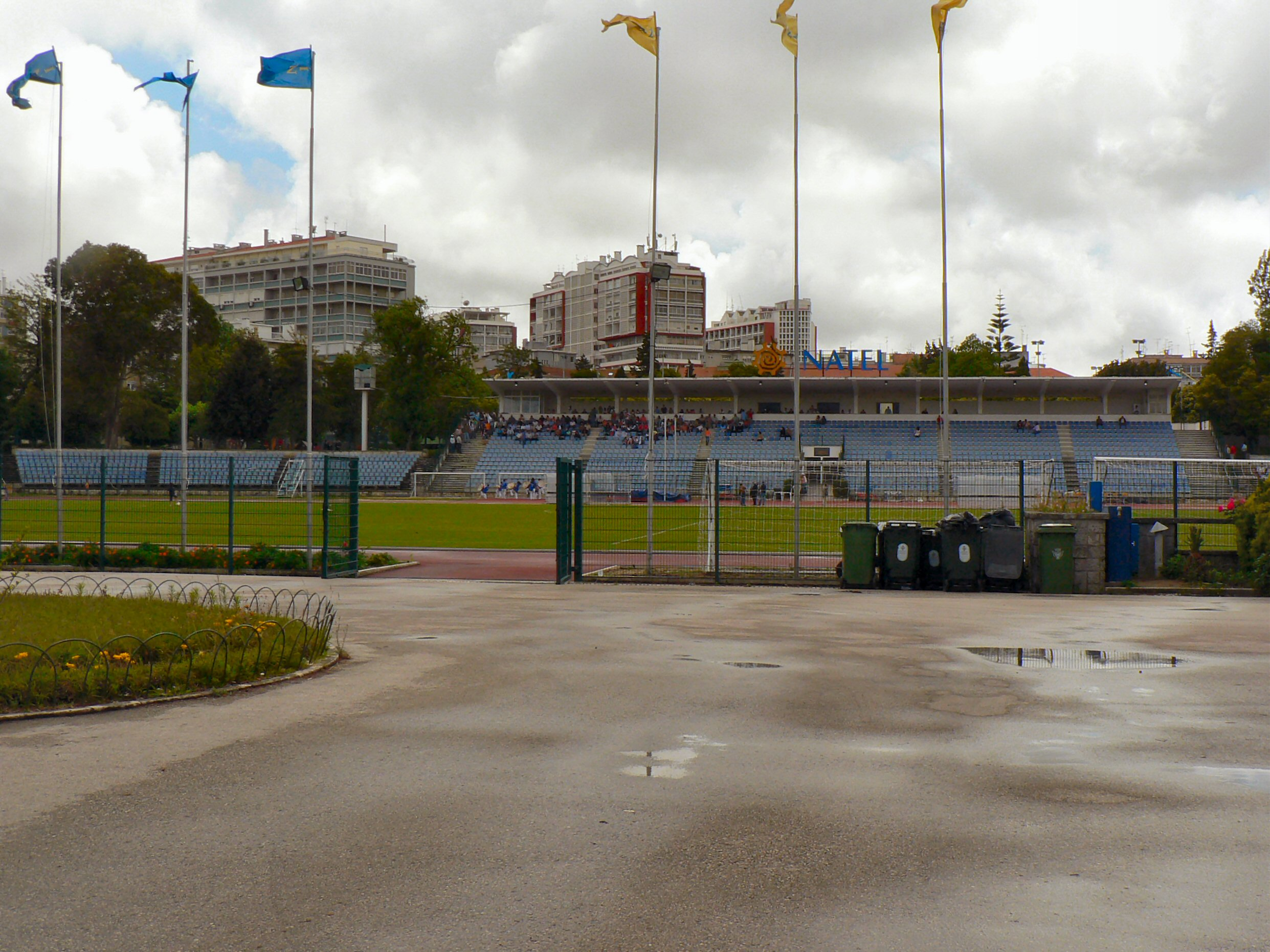 Estádio do Inatel em Lisboa